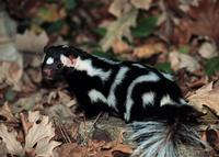 Eastern Spotted Skunk (Spilogale putorius)